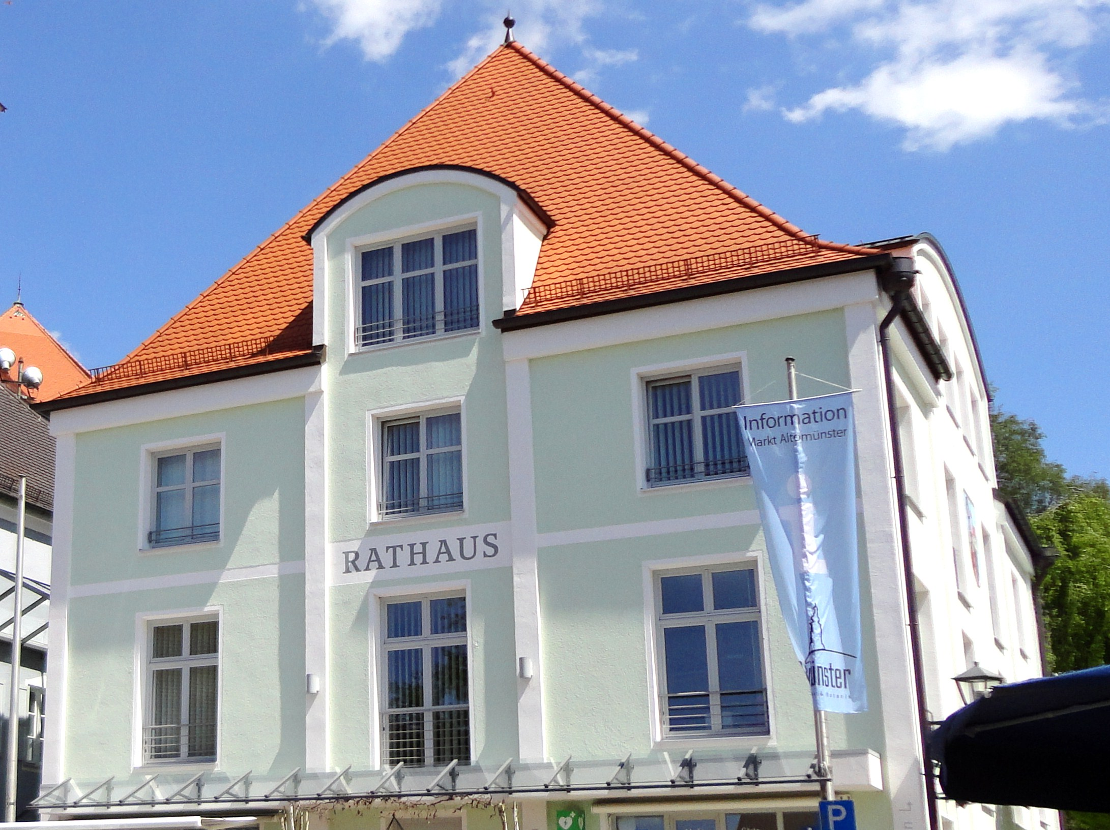 Rathaus in Altomünster (2012)